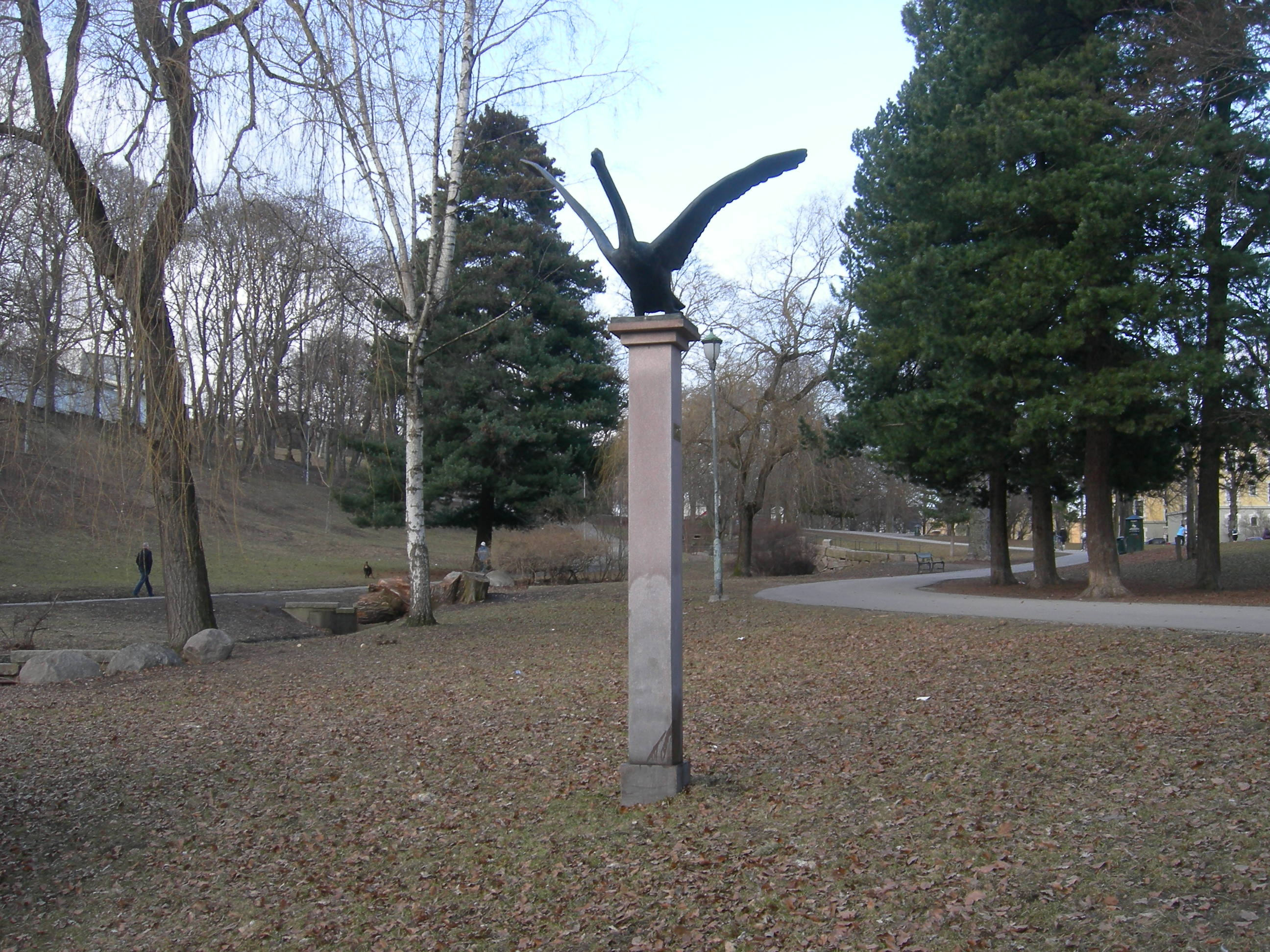 Skulpturen "Svane", St. Hanshaugen park, Oslo